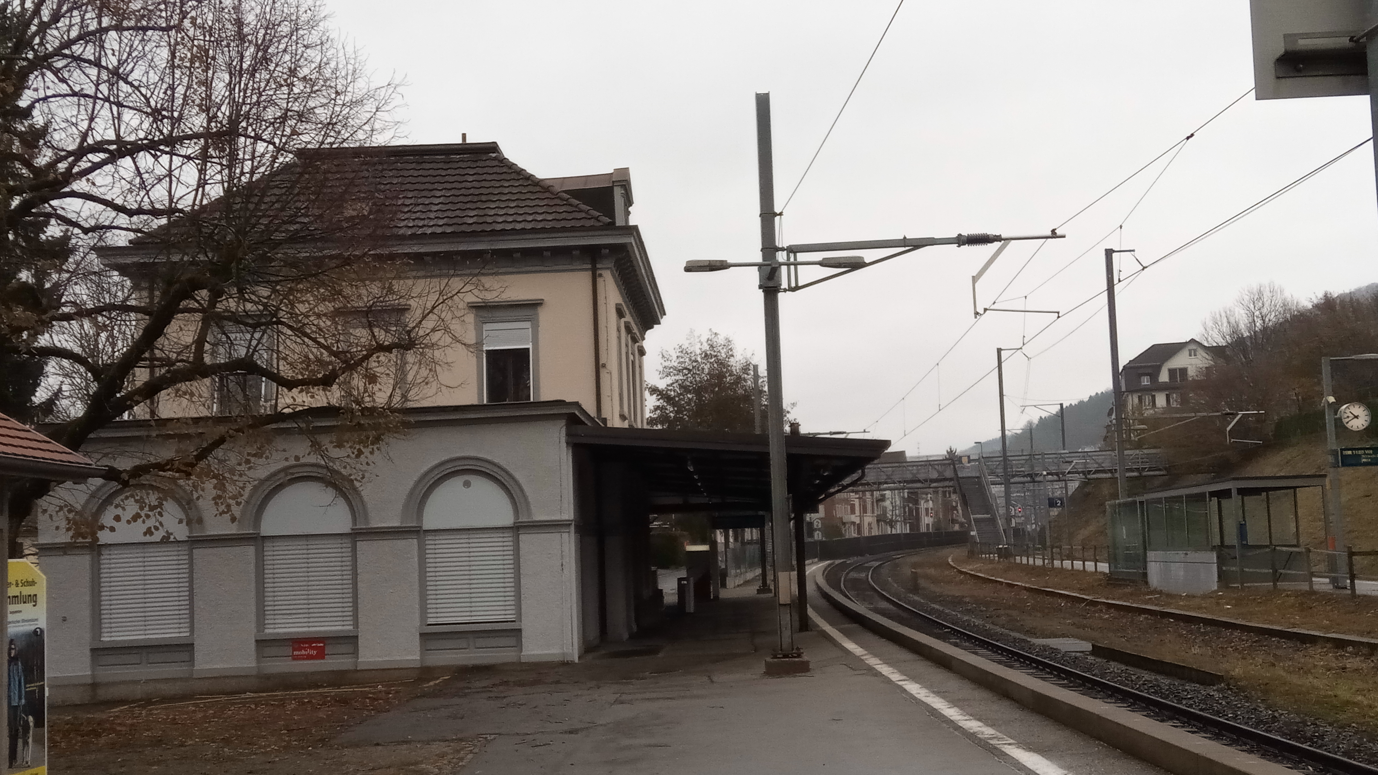 Bahnhofsgebäude SBB, St. Gallen Bruggen